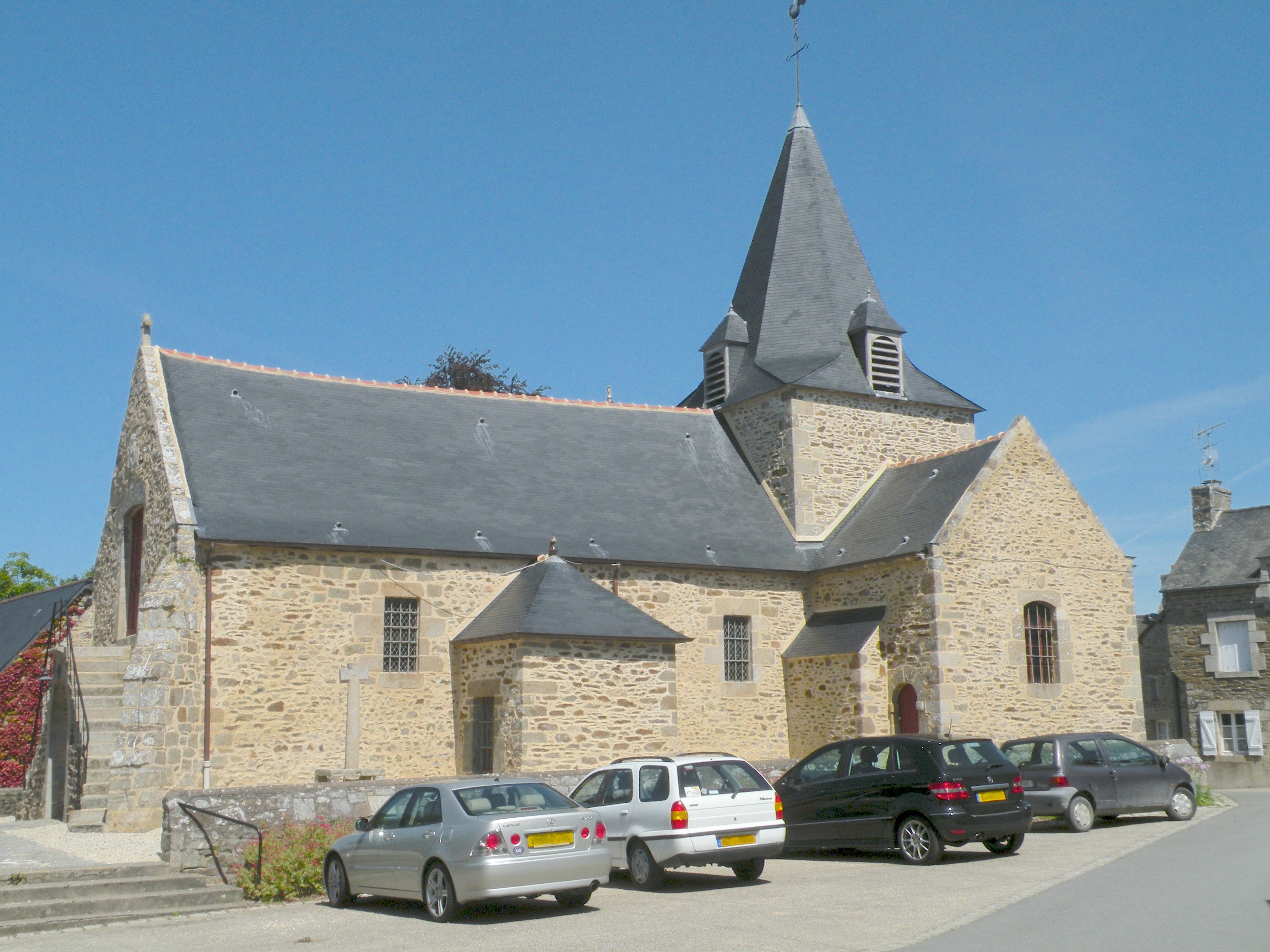 Église Saint-Laurent de Langrolay-sur-Rance.